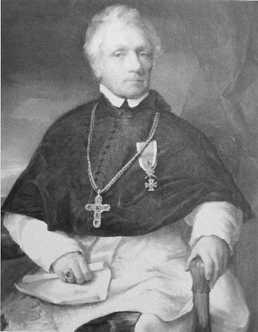 Ambros Becziczka (1780–1861)